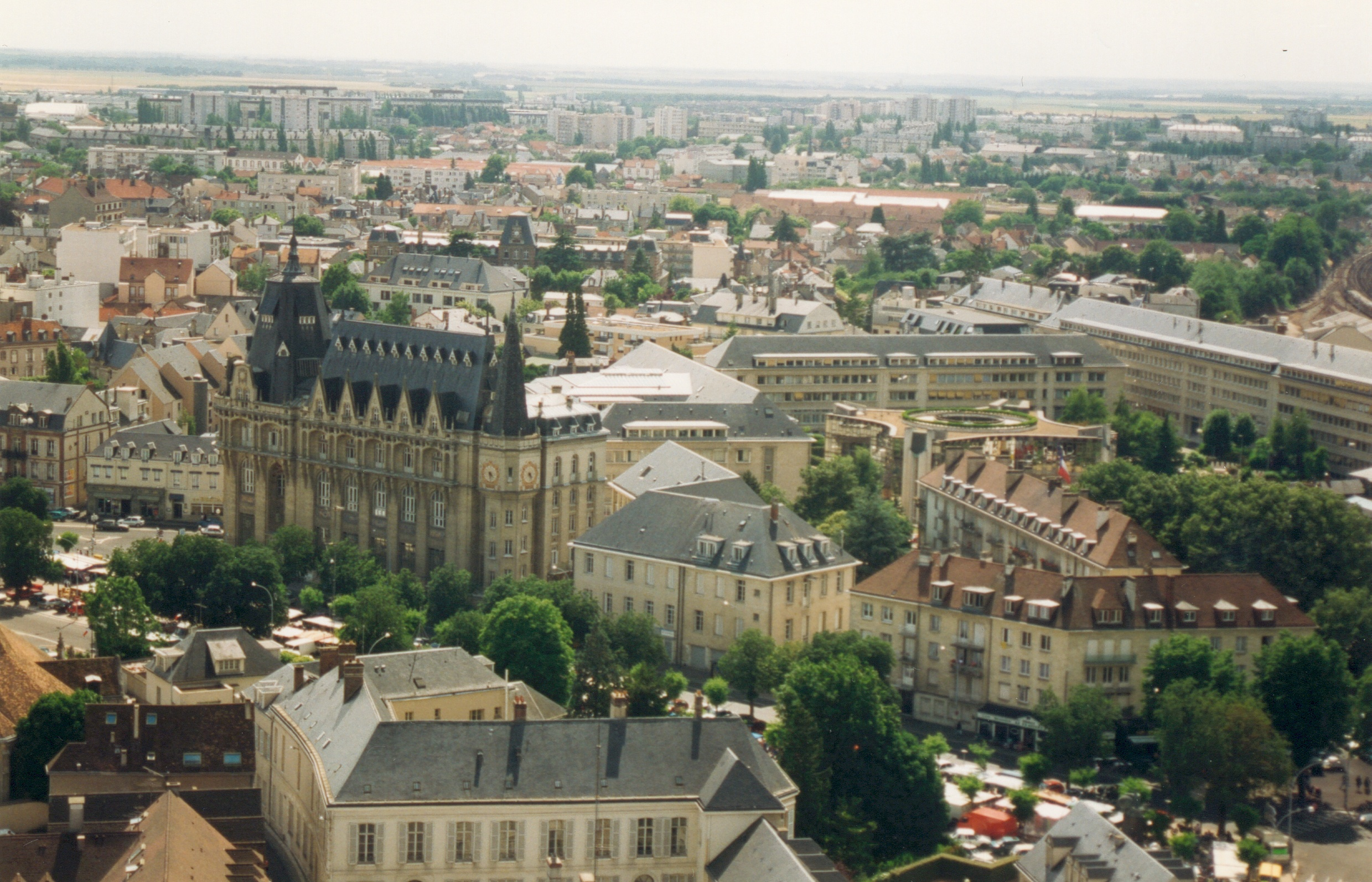 France Eure et Loir Chartres Hôtel des Postes et Cité administrative vus depuis le clocher ouest de la Cathédrale. Photographie prise par GIRAUD Patrick.